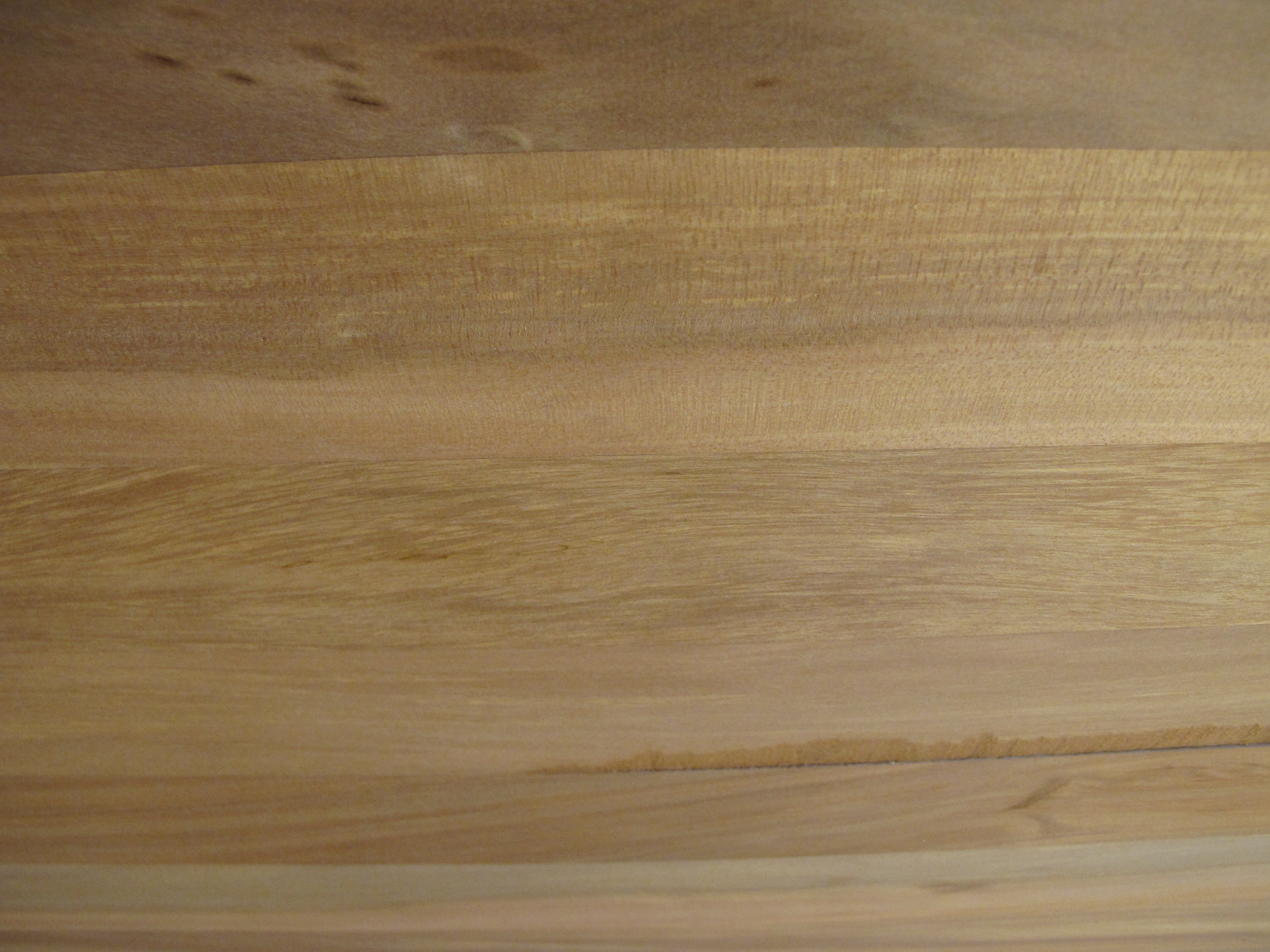 Ved fra Calophyllum brasiliense Camb, Santa Maria